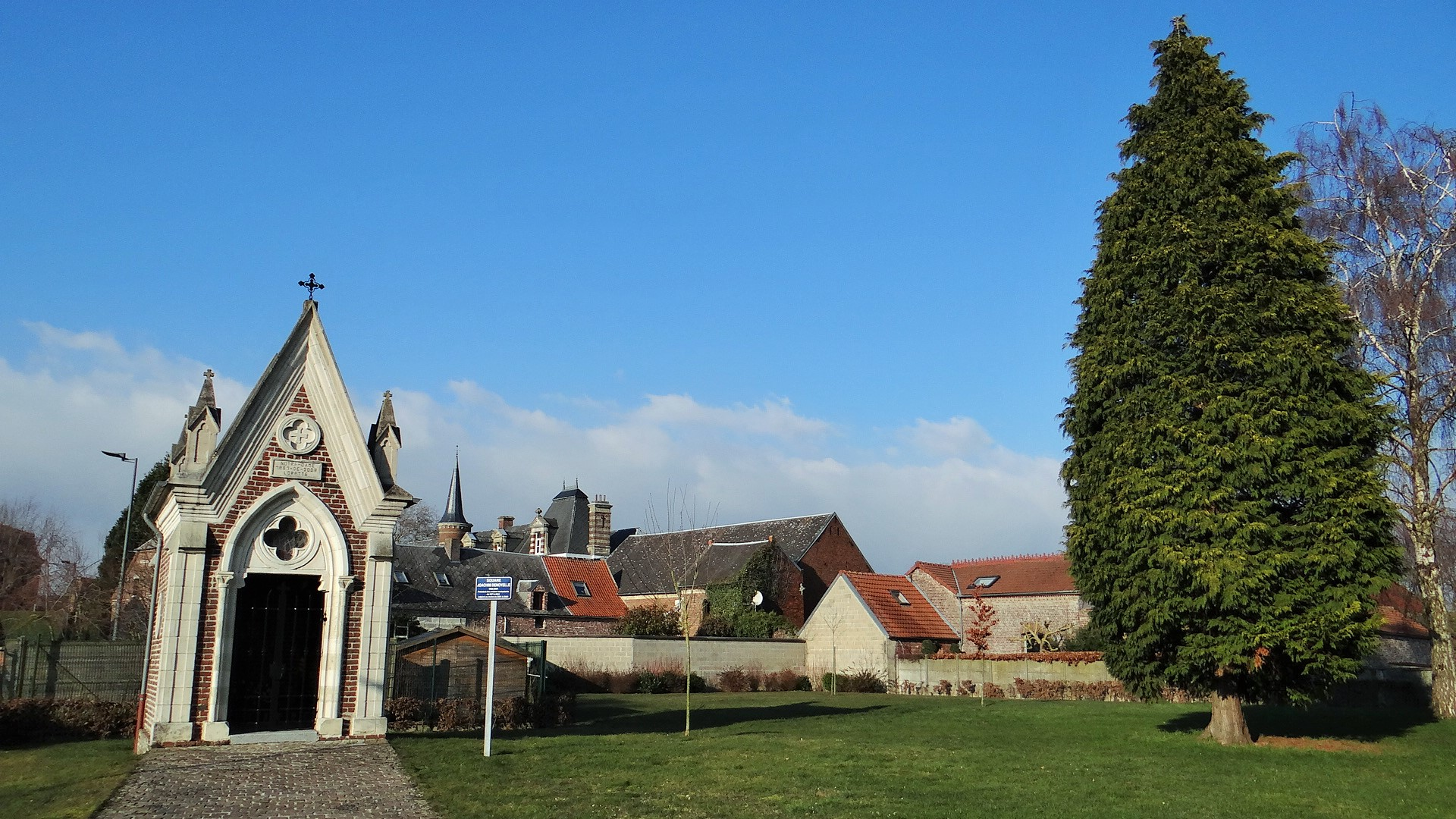 Chapelle Notre Dame de Lorette de Villers en Cauchies, à proximité de l'église